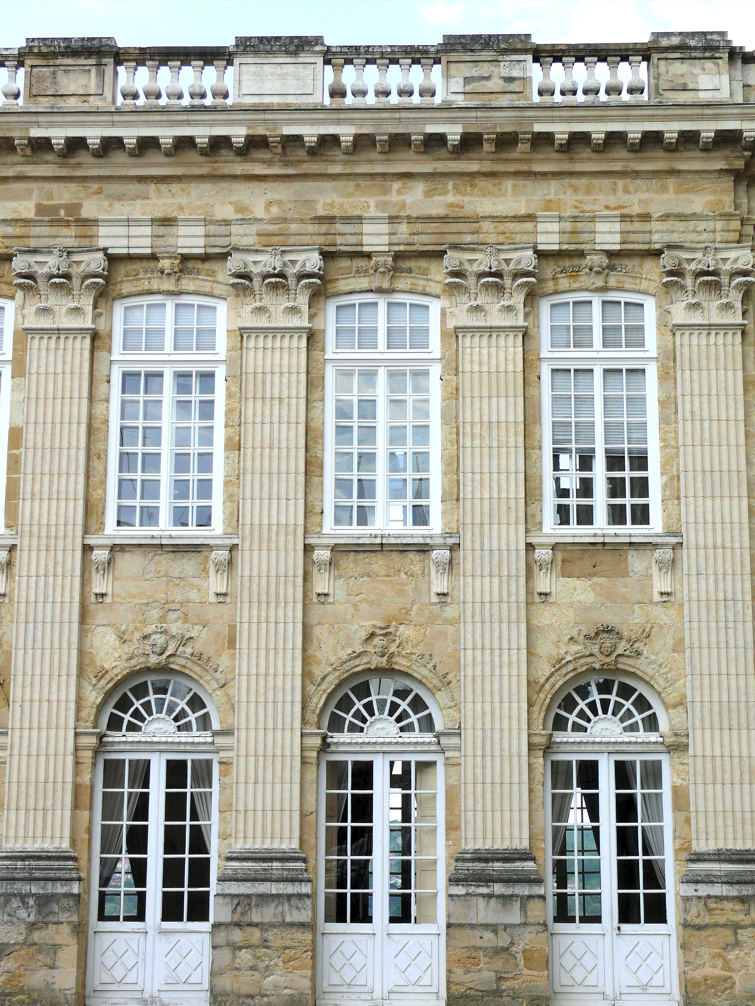 Auch - Préfecture du Gers, ancien palais archiépiscopal